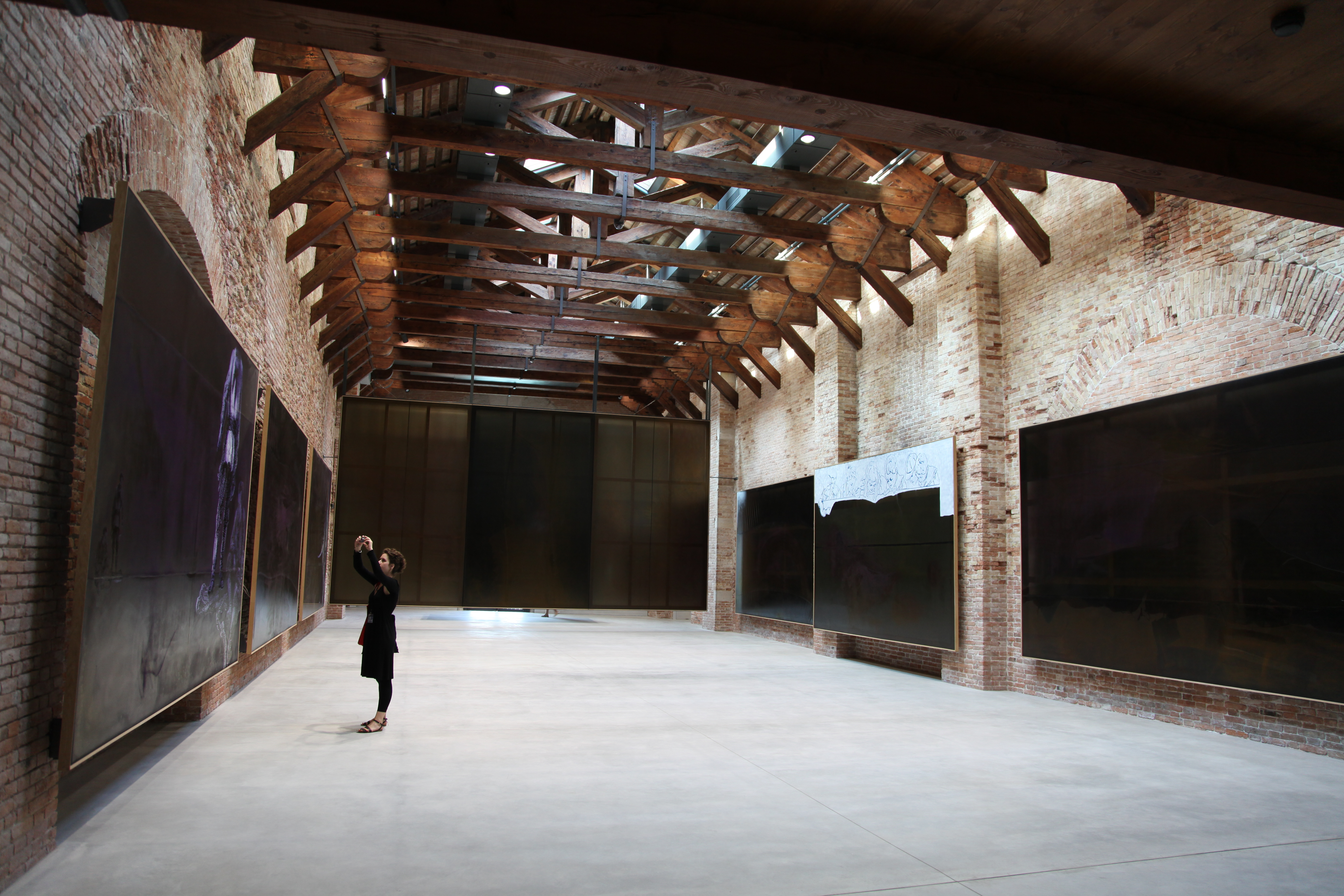 Inside Punta della Dogana during the 2009 Venice Biennale